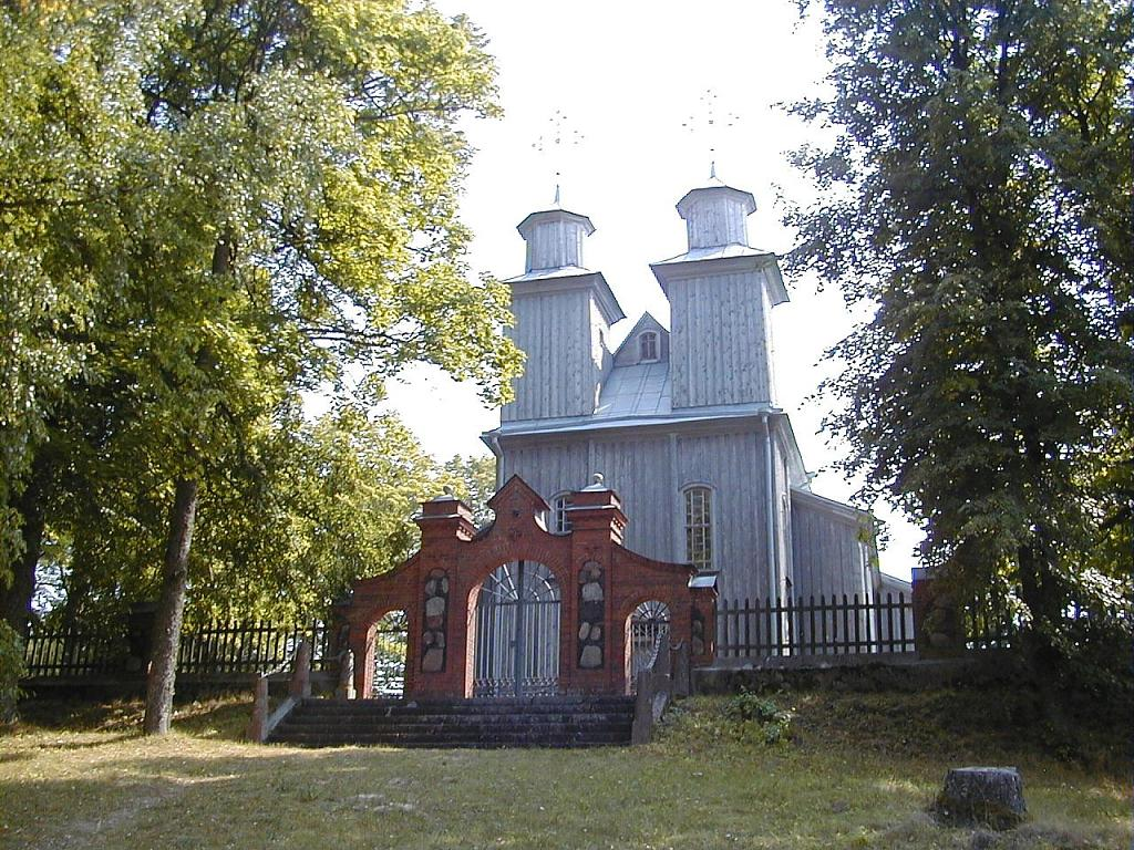 Bērzgales baznīca Aglonas pagastā 2002-08-11